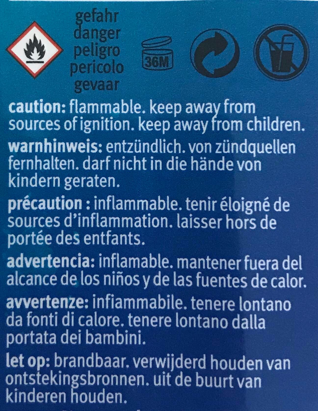 Gefahrenhinweise auf Nagellackentfernern